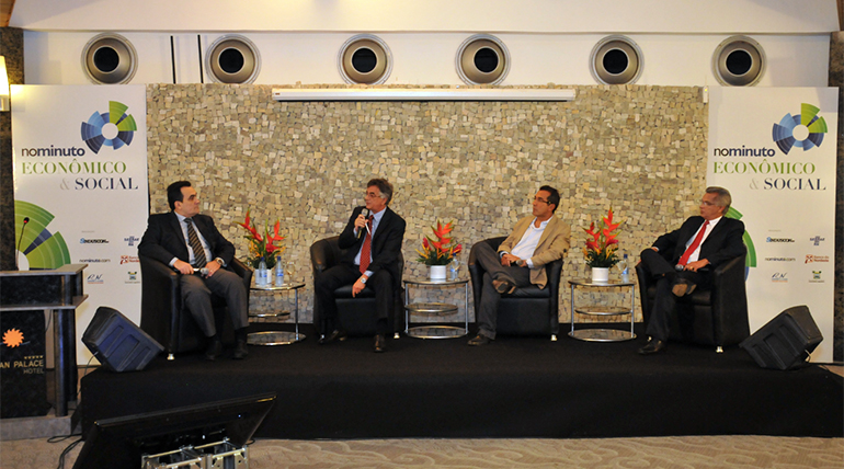 Em novembro de 2012, o portal promoveu o 1º Seminário Nominuto Econômico e Social, numa parceria com a Sinduscon (Sindicato da Construção Civil), no Ocean Palace Hotel.